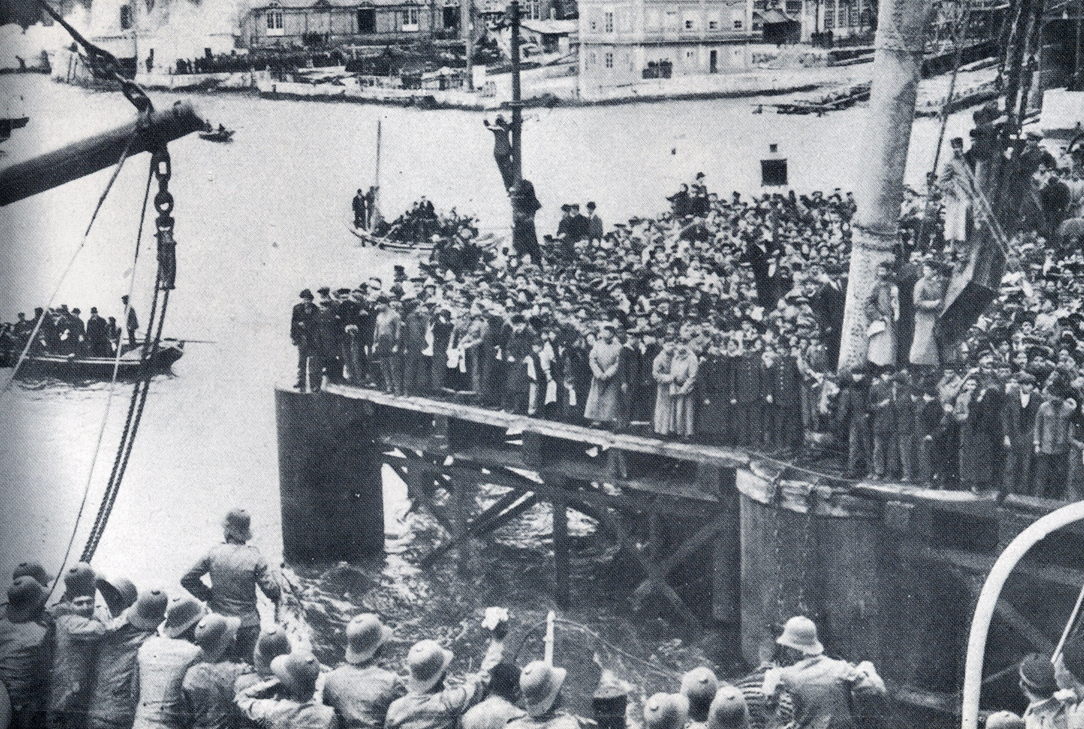 Embarque de tropas portuguesas para Angola, durante a 1ª Guerra Mundial do cais do Arsenal.